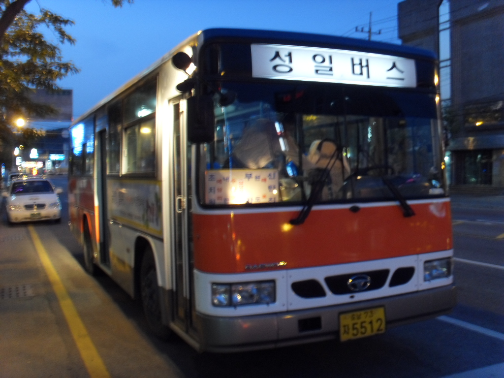 연기군의 버스인 성일버스입니다.